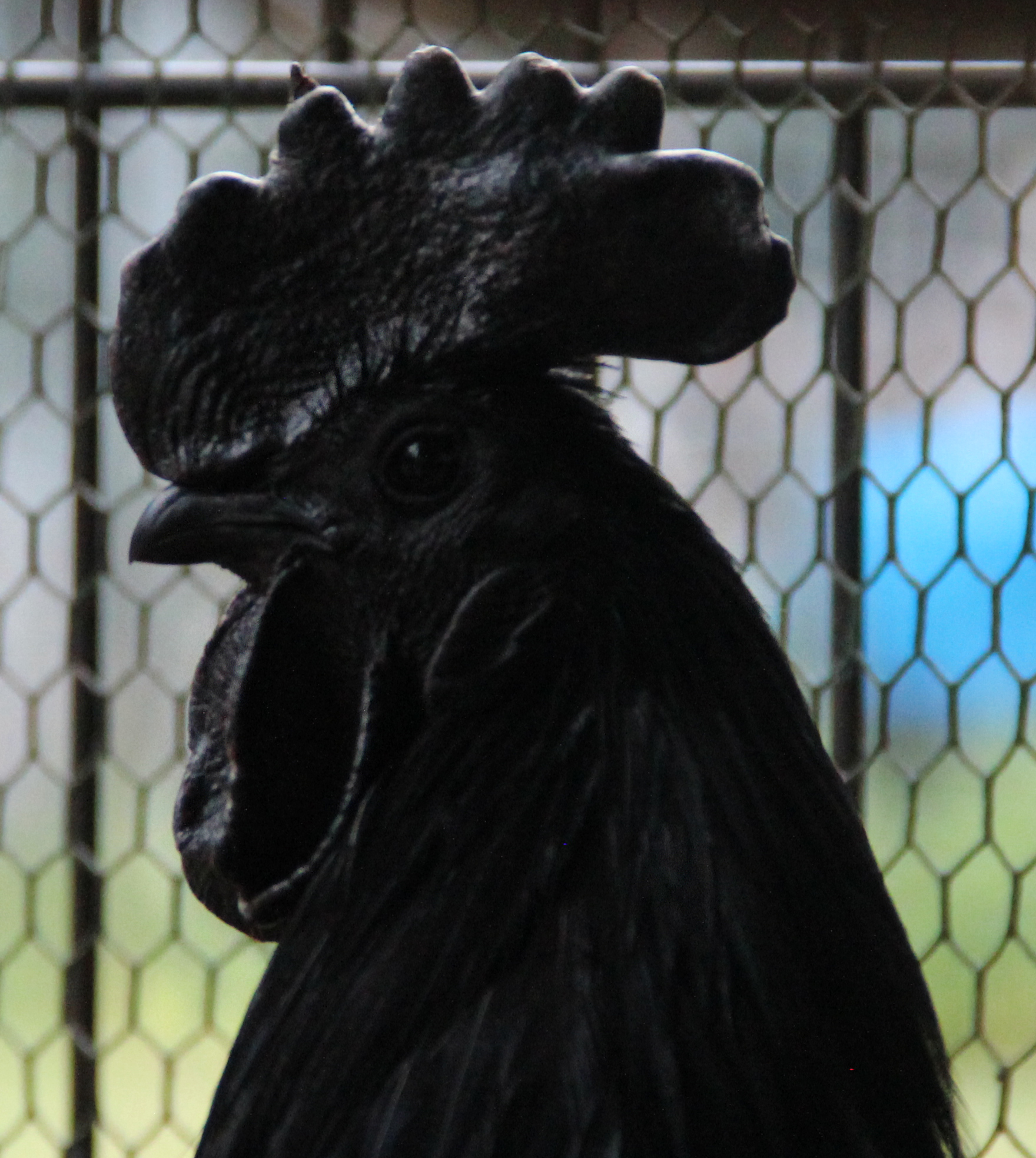 Kopstudie van een Ayam cemani